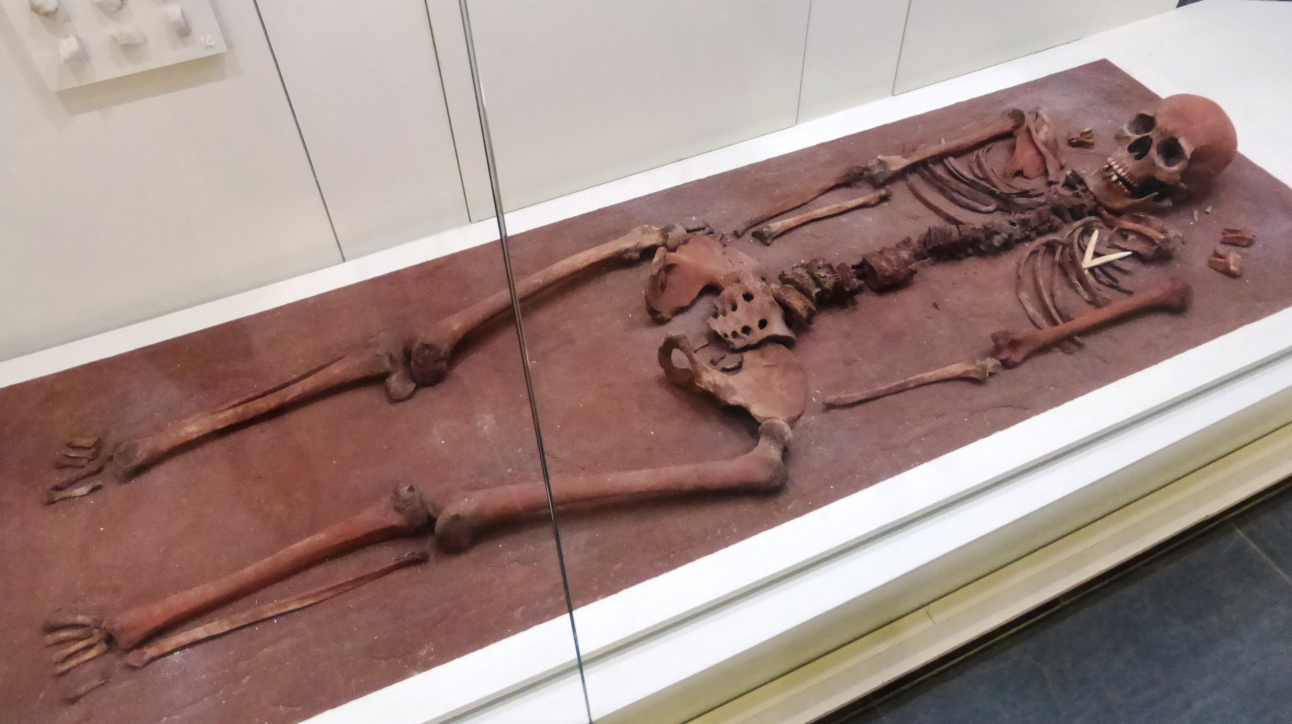 Реконструкция захоронения № 132 Оленеостровского могильника (Онежское озеро). Экспонат Национального музея республики Карелия.